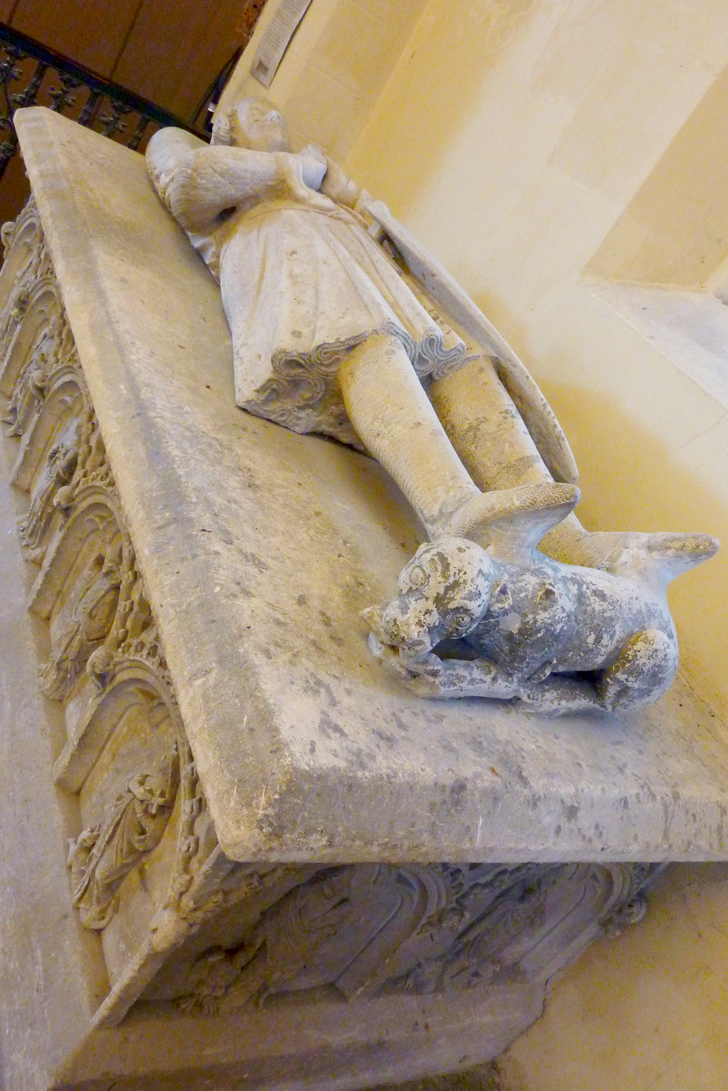 katholische Pfarrkirche Saint-Maclou in Conflans-Sainte-Honorine im Département Yvelines (Île-de-France)